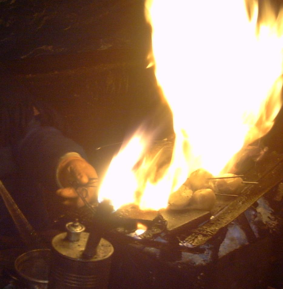 Anticuchos en Bolivia Foto del anticucho hecho en La Paz, cerca del la plaza Perez Velasco. Trabajo propio.